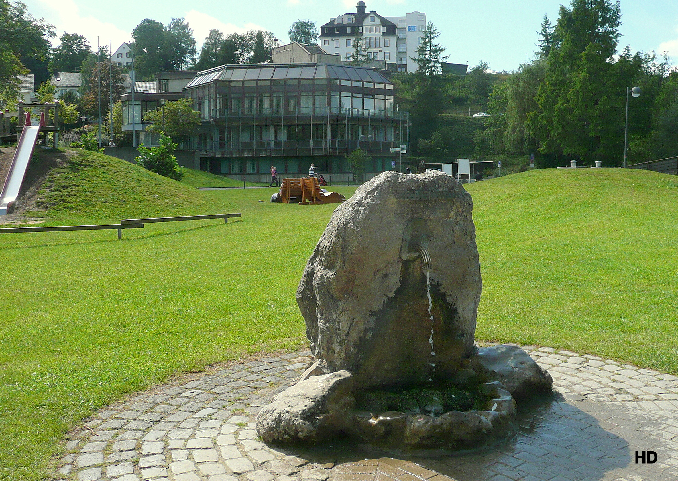 Mineralbrunnen Helenenquelle, Gerolstein